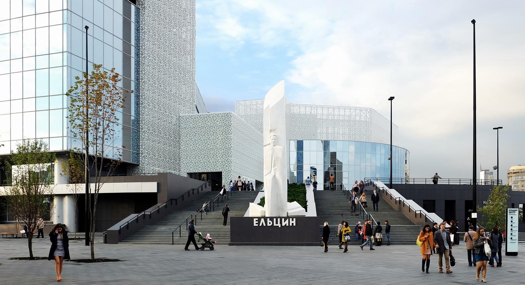 Ельцин центр на улице Ельцина в Екатеринбурге. 30 сентября 2016 года.